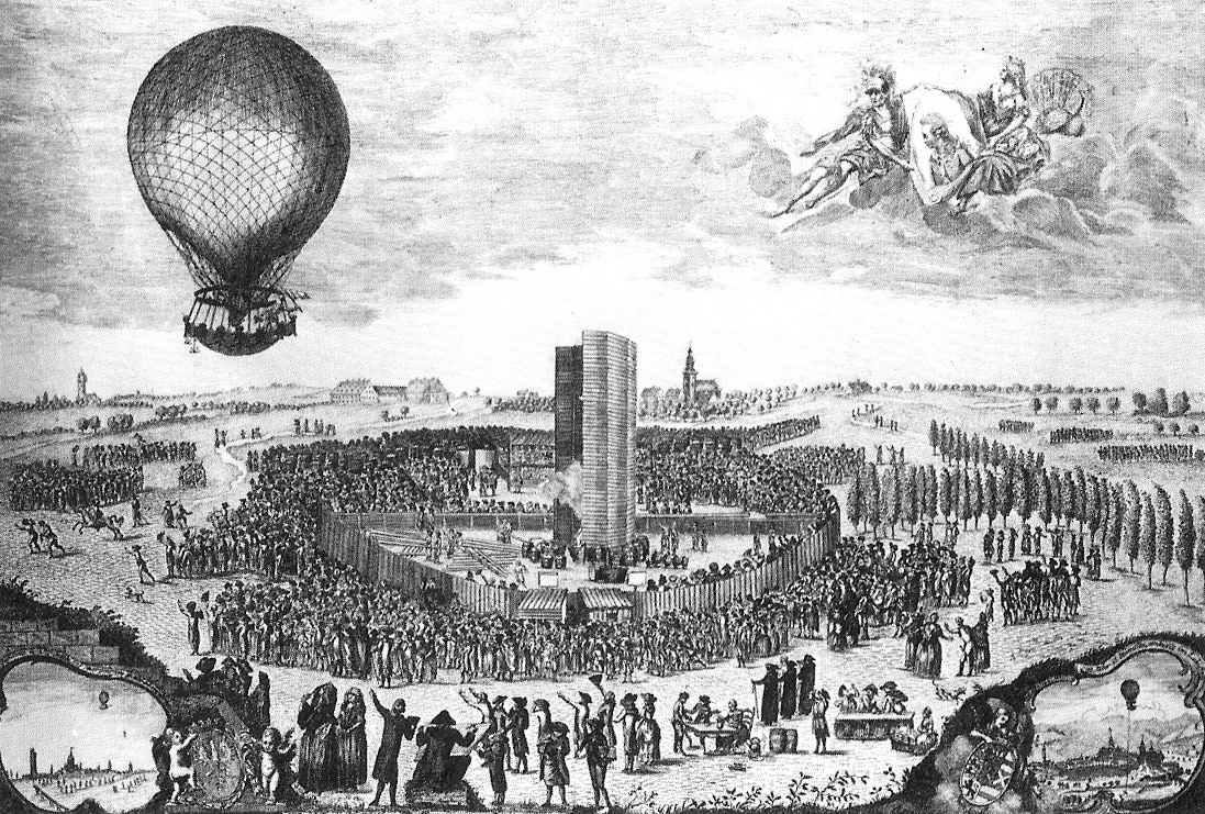 Der französische Ballonfahrer Jean-Pierre Blanchard steigt vor großem Publikum auf der Bornheimer Heide in Frankfurt am Main mit seinem Gasballon auf. Am 3. Oktober 1785 startete er hier in Frankfurt am Main anlässlich der Herbstmesse zur ersten Luftreise in Deutschland und fuhr von der Bornheimer Heide bei Bornheim nach Weilburg an der Lahn. Blanchard nahm für sich die Erfindung des Fallschirms in Anspruch und ließ bei diesem Aufstieg erstmals seinen Hund mit dem Fallschirm zur Erde herunterschweben, der auch wohlbehalten sein Ziel erreichte. Dies ist die Darstellung des Ereignisses anlässlich der Frankfurter Herbstmesse am 3. Oktober 1785. Zeitgenössischer Stich aus dem 18. Jahrhundert, Urheber unbekannt. Im Stadtteil Frankfurt-Bockenheim wurde später eine Straße nach ihm benannt.